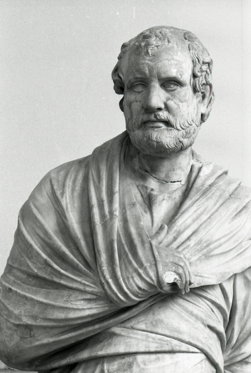 Servizio fotografico : Napoli, 1969 / Paolo Monti. - Strisce: 7, Fotogrammi complessivi: 34 : Negativo b/n, gelatina bromuro d'argento/ pellicola ; 35 mm. - ((I fotogrammi hanno una doppia numerazione. . - Sul portanegativi: Nikon FP4. - All'interno e sul dorso del portanegativi Monti specifica: "Sofocle. Eschilo. Esiodo. Caracalla. Socrate. Garzanti". - Occasione: Pubblicazione, Enciclopedia dell'Arte, ed. Garzanti 1973. - Fonte: Agenda di Paolo Monti: Monti - Agenda 1969 (1969), presso Archivio Paolo Monti